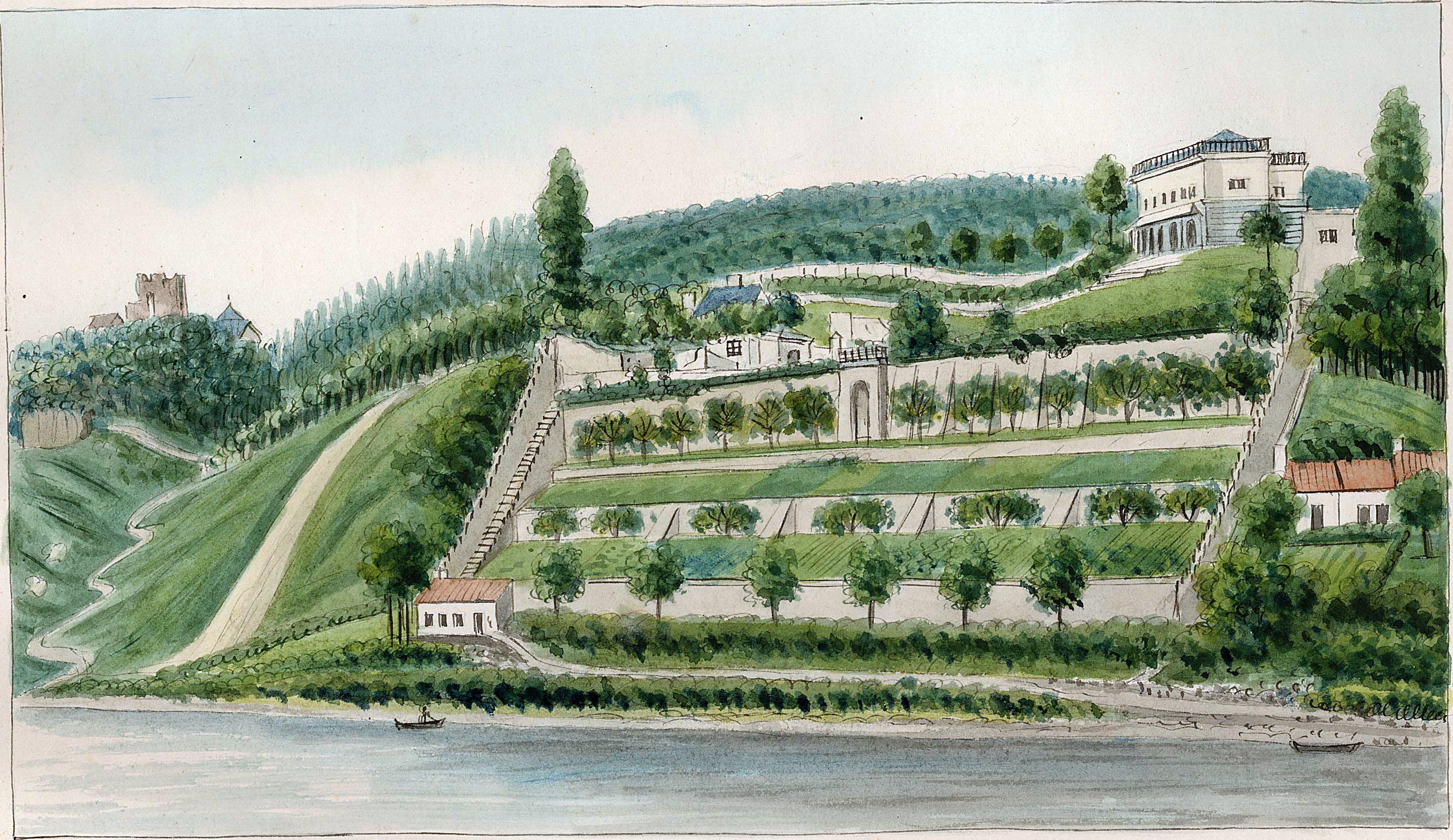 Tekening van Philippe van Gulpen van de buitensociëteit Slavante op de Sint-Pietersberg in Maastricht. Onderschrift: "Slevante et le nouveau casino militaire bâti en 1845 et la ruine de Lichtenberg dans le lointain près Maestricht". Collectie Van der Noordaa in het RHCL, Maastricht, CVDN 70.